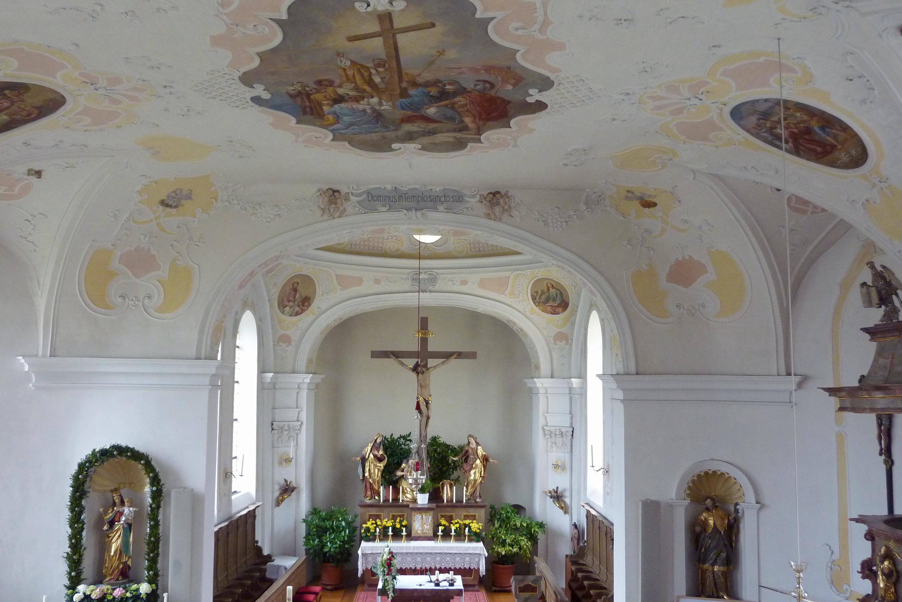 Katholische Pfarrkirche St. Sixtus in Weisingen (Holzheim) im Landkreis Dillingen an der Donau (Bayern); Innenraum